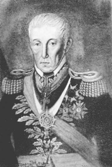 Marechal Joaquim Xavier Curado